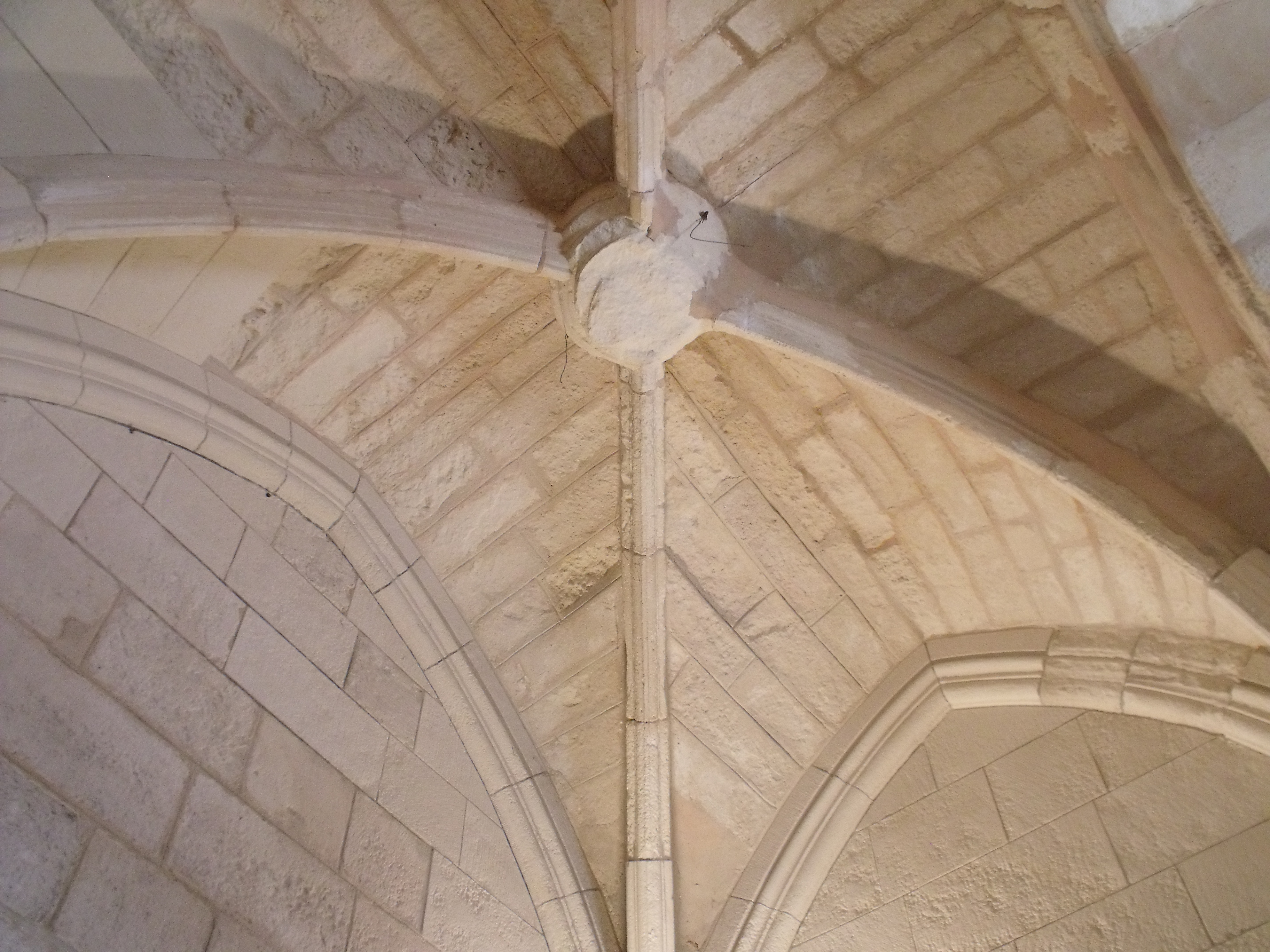 Torre de San Nicolás en La Rochela.